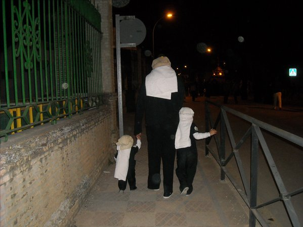 La Pasión según los herrereños